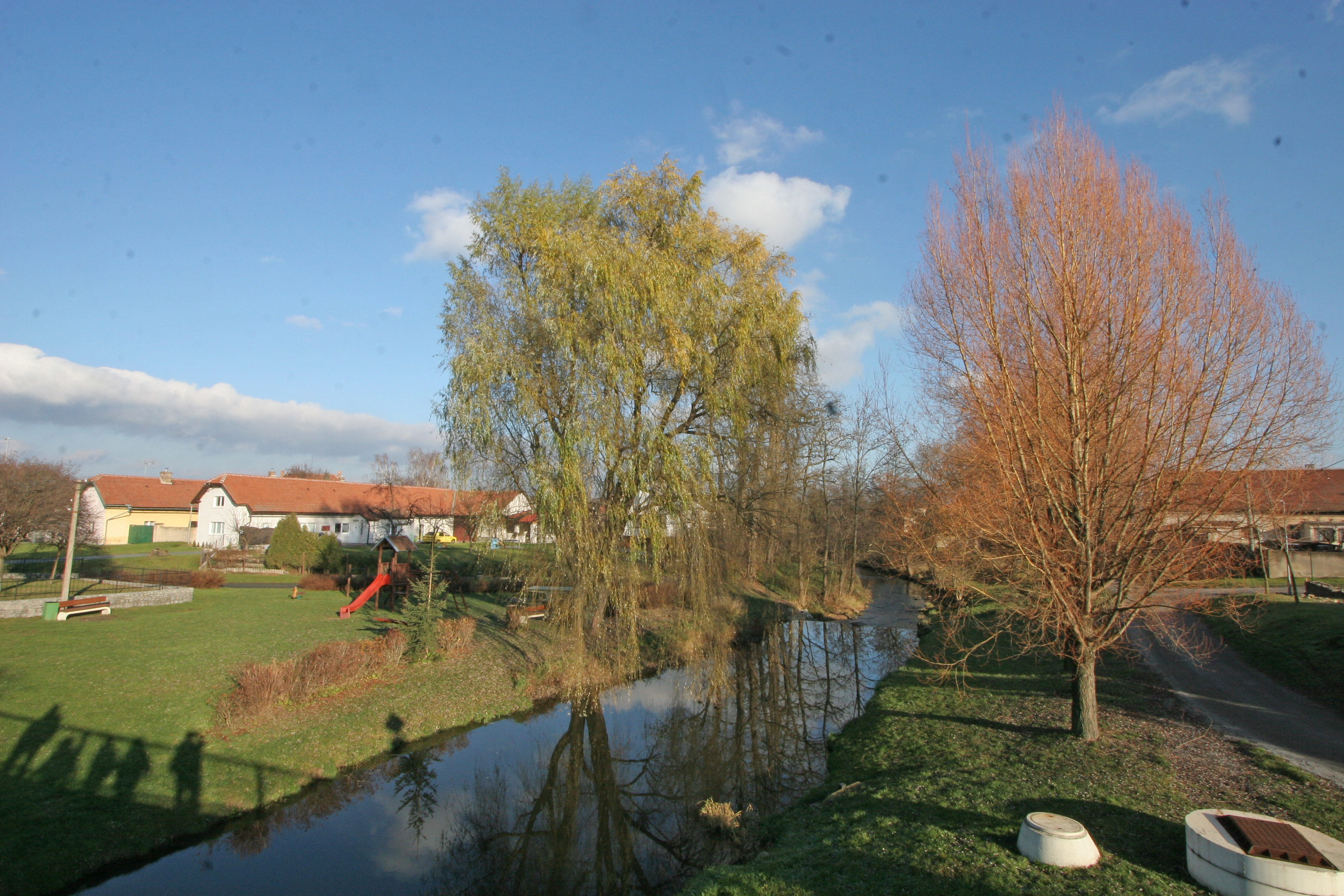 Výrovka v Radimi